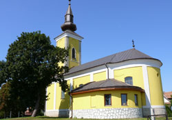 Orosi templom